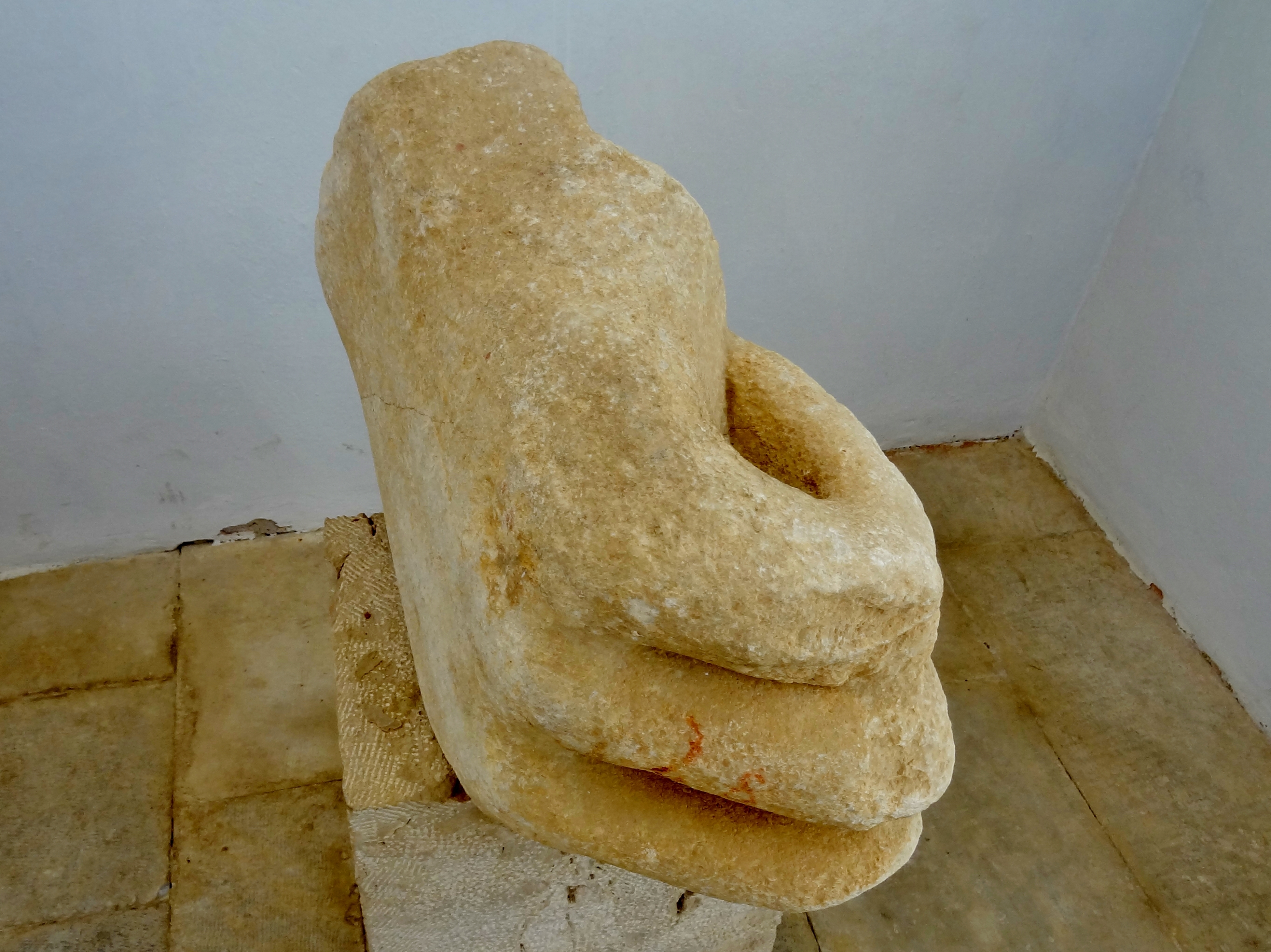 Teil der linken Hand des Kolosses der Naxier im Museum von Delos, Kykladen, Griechenland